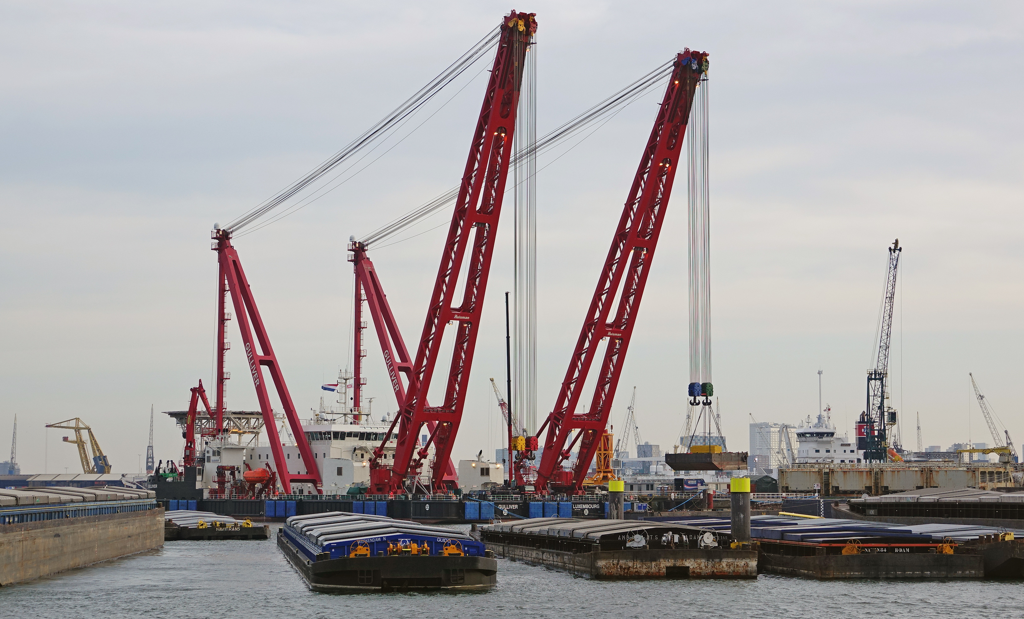 Testponton in de takels van de GULLIVER , Rog Ship Repair Waalhaven Rotterdam 15-3-2018